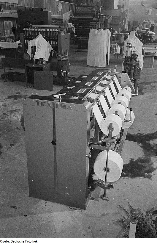 Original image description from the Deutsche Fotothek Textilindustriemaschine des VEB Kombinat Textima Karl-Marx-Stadt auf der Leipziger Herbstmesse 1954